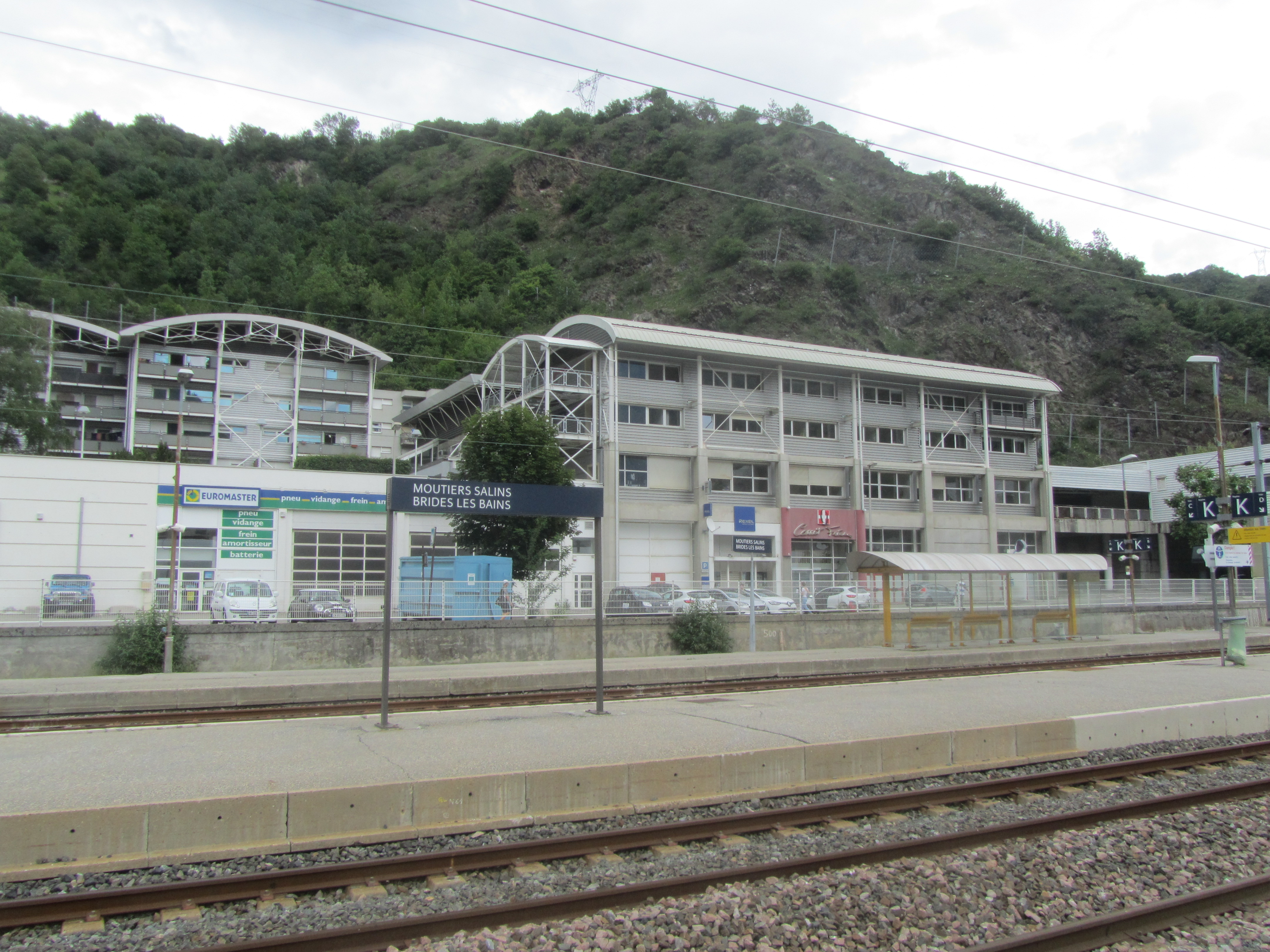 Ces immeubles ont été construits après destruction de l'aciérie